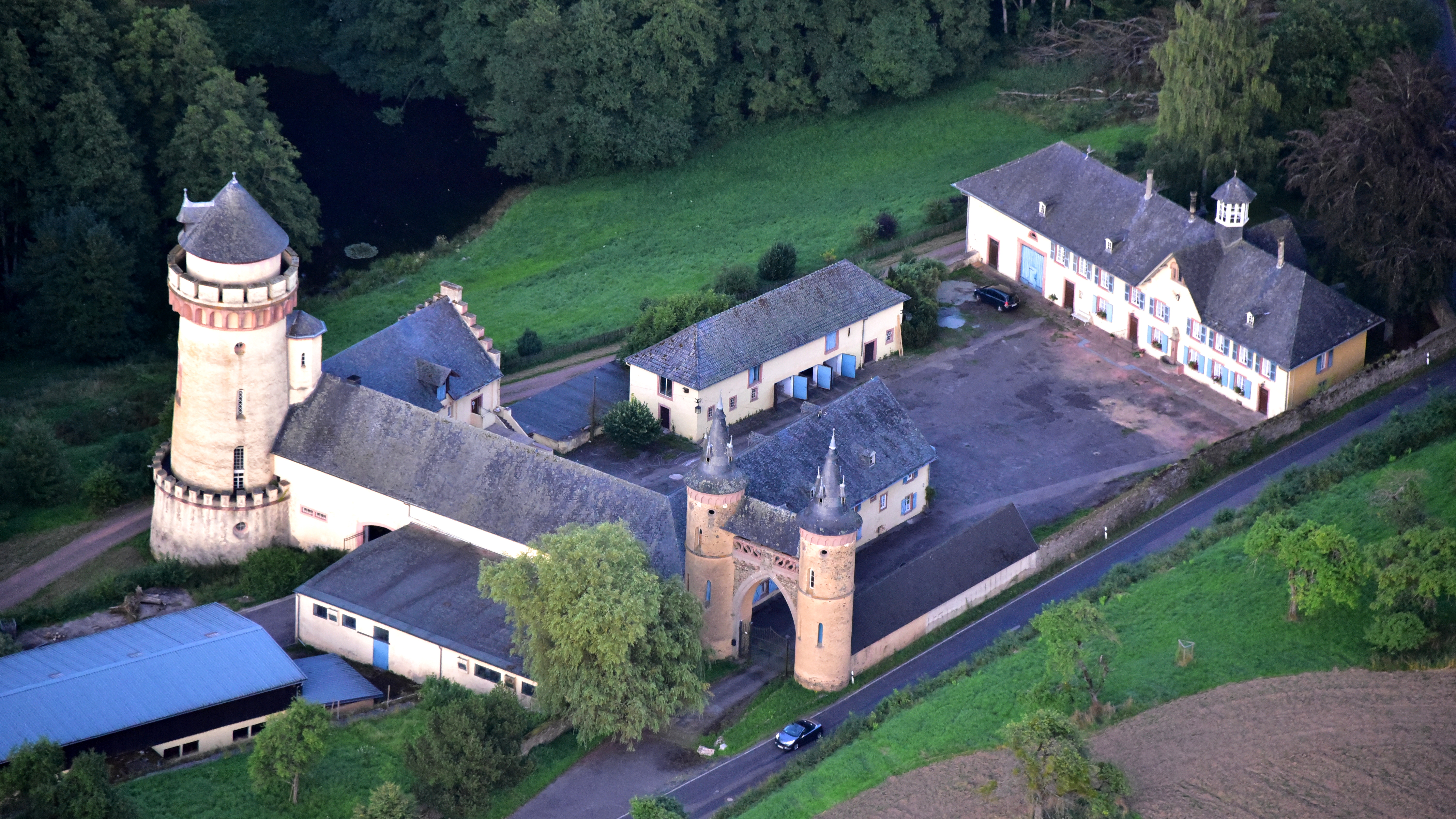 Burg Heid, Luftaufnahme (2016)